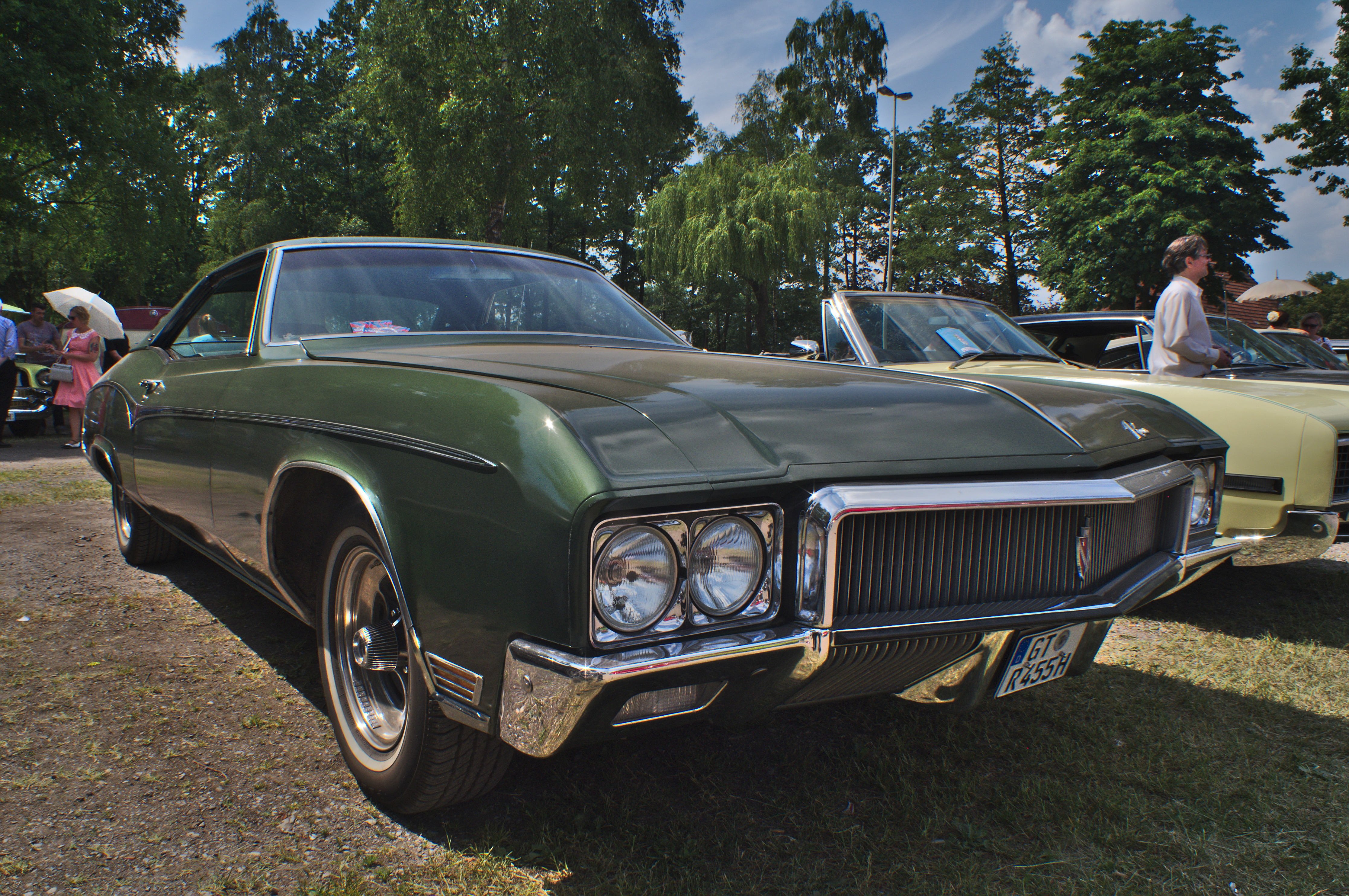 Strassenkreuzer Treffen Kaunitz 2018